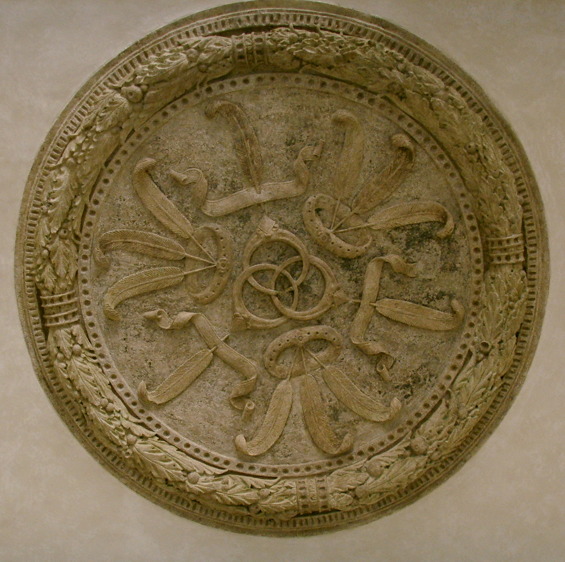 see filename Emblemi de'Medici